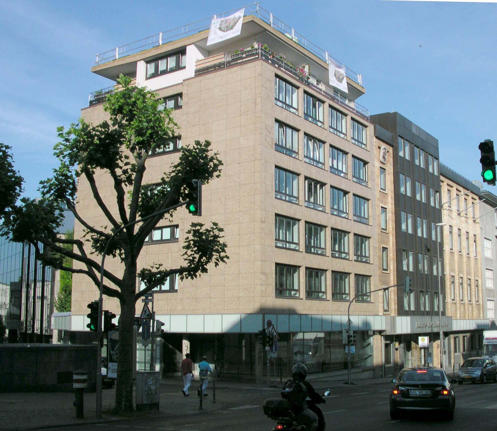 Aachen, Gebäude der Industrie- und Handelskammer an der Theaterstraße